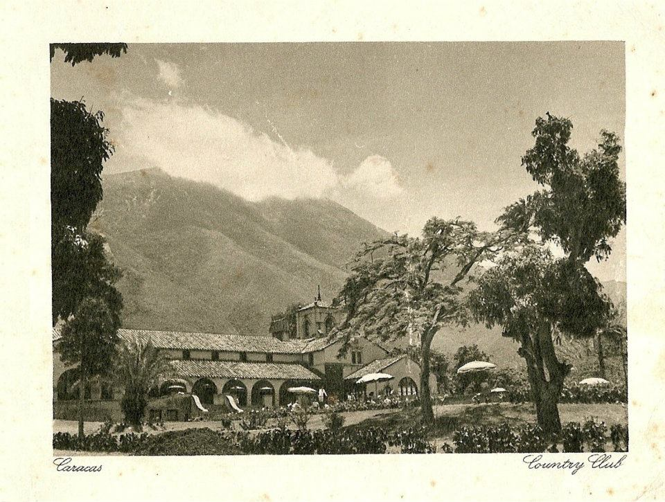 Postal venezolana del año 1950 don se apresia la casa club del Country Club de Caracas, en el municpio Chacao, estado Miranda - Venezuela (1950)